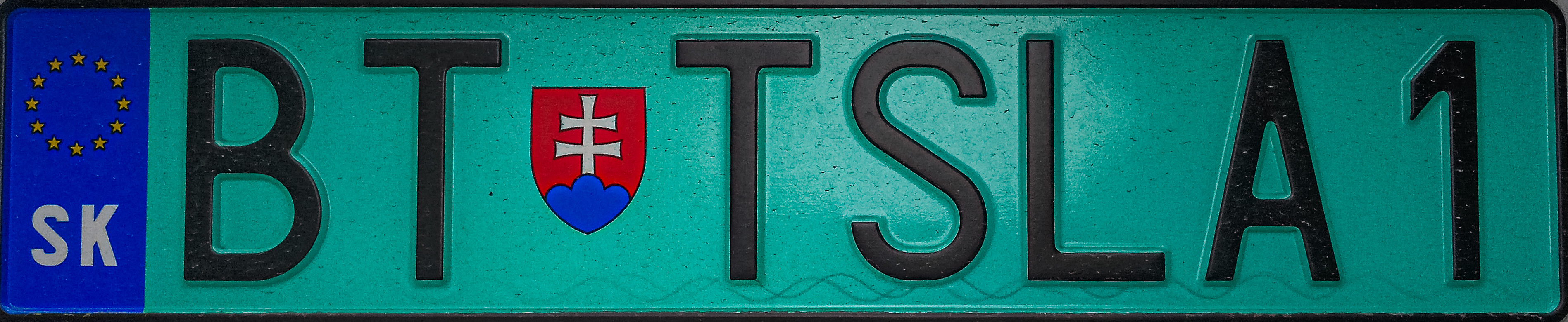 Evidenčné číslo s voliteľnou logistikou pre elektromobily, respektíve vozidlá, ktoré kombinujú benzínový alebo naftový pohon s elektrickým plug-in hybridným pohonom či benzínový a LPG pohon s elektrickým plug-in hybridným pohonom.